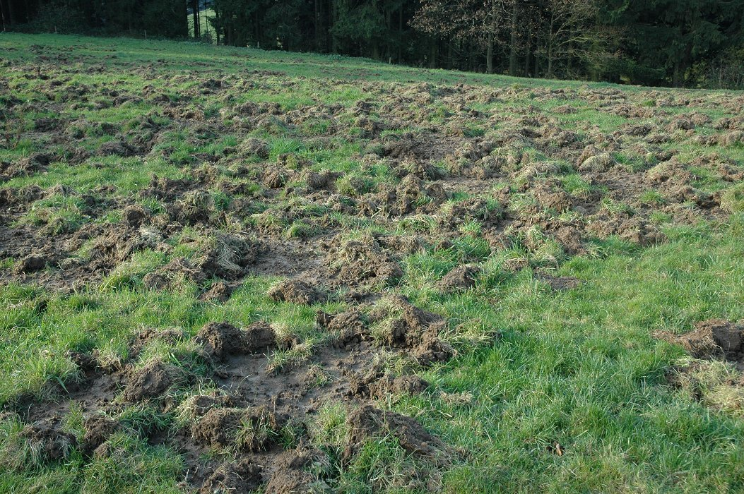 Wildschaden an Grünland durch Wildschweine; Ort: Weide am Süntel (Gebirge in Niedersachsen)